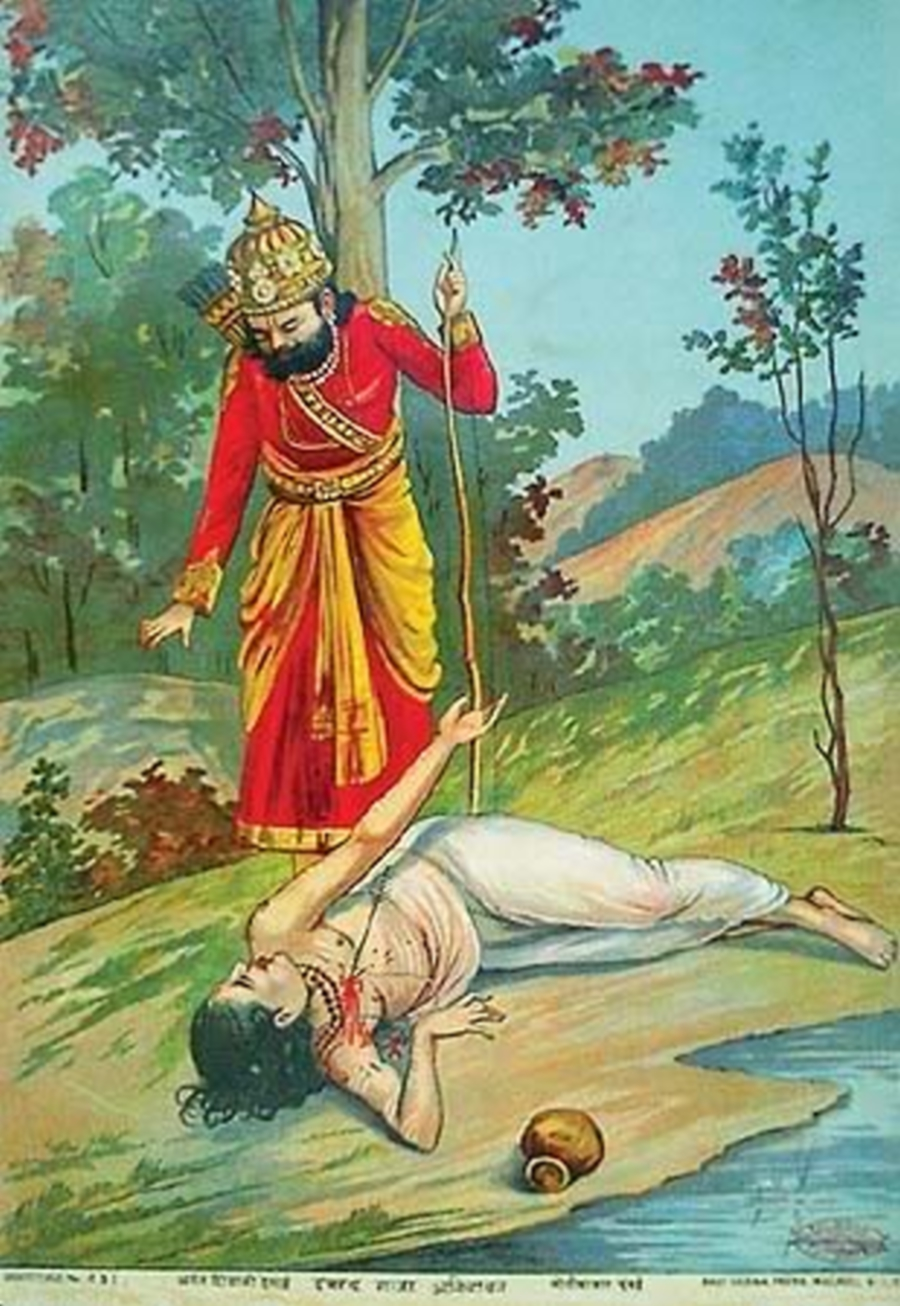 Abhimanyu Laxman Vadh